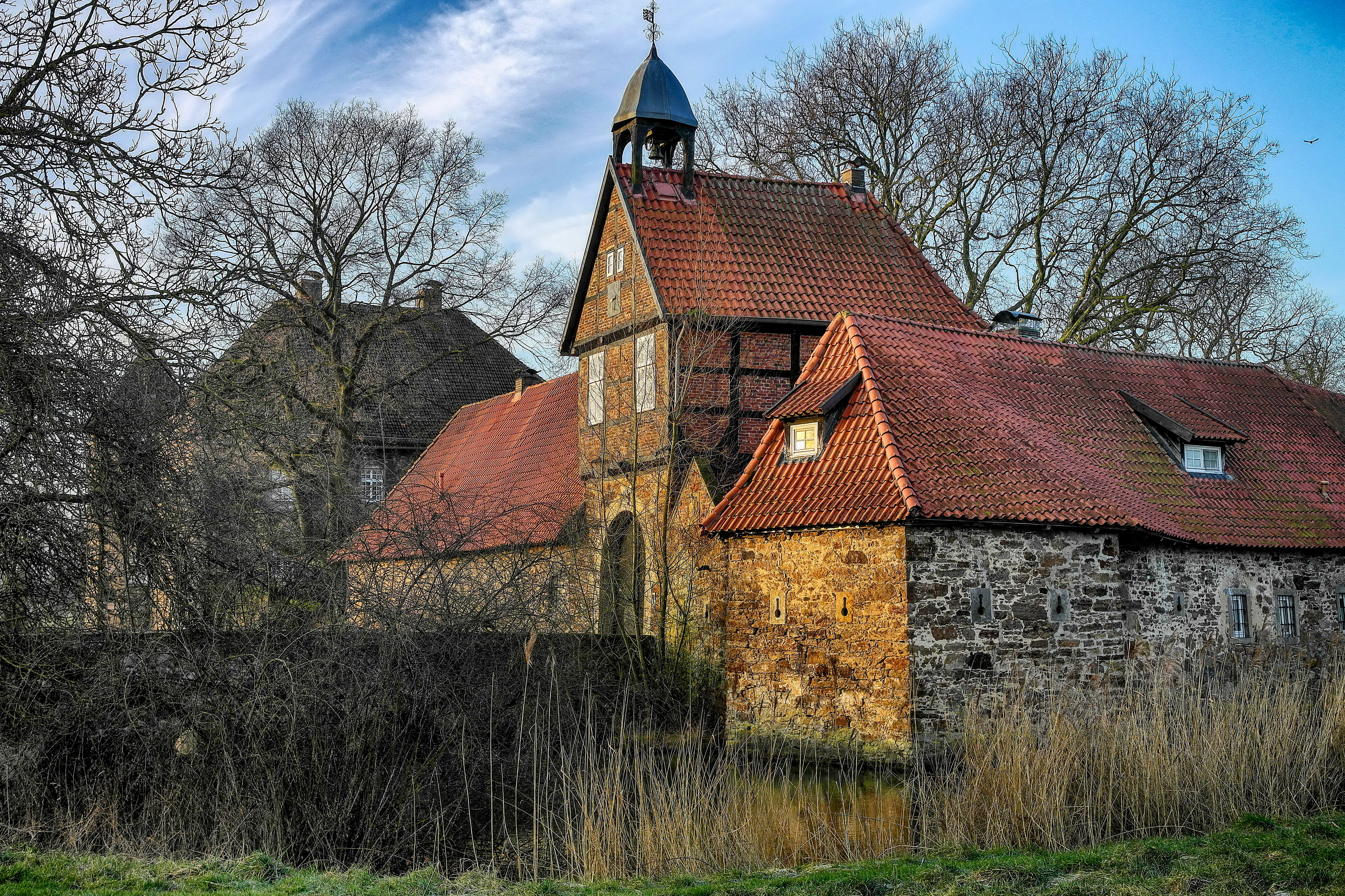 Das Gut Stockhausen, auch Burg Stockhausen oder Haus Stockhausen genannt ist eine Wasserburg am südwestlichen Rand der Lübbecker Ortschaft Stockhausen. Ihre Anfänge sind nicht genau bekannt, reichen jedoch mindestens in das 14. Jahrhundert zurück. This image shows a heritage building in Germany, located in the North Rhine-Westphalian city Lübbecke (no. 004).